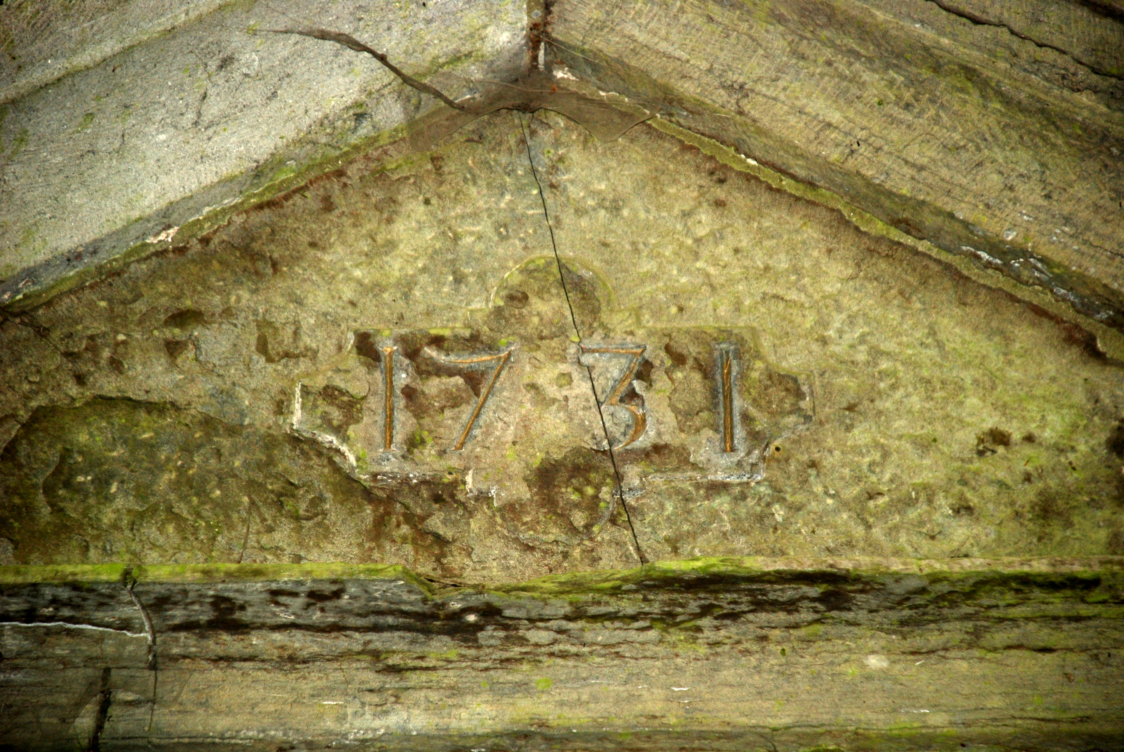 Belgique - Brabant wallon - Villers-la-Ville - Chapelle Notre-Dame des Affligés